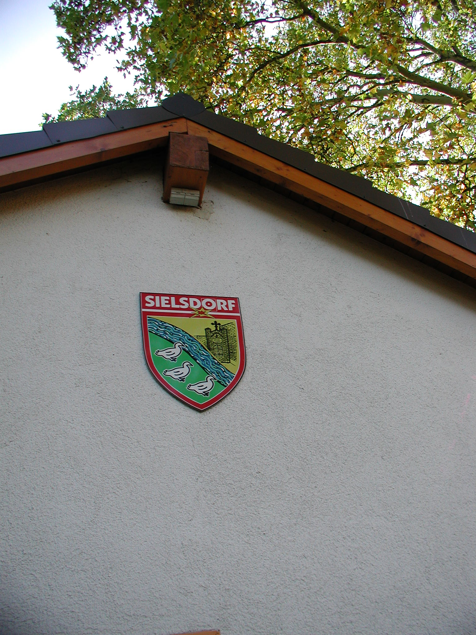 Hürth-Sielsdorf, Dorfgemeinschaft Sielsdorf